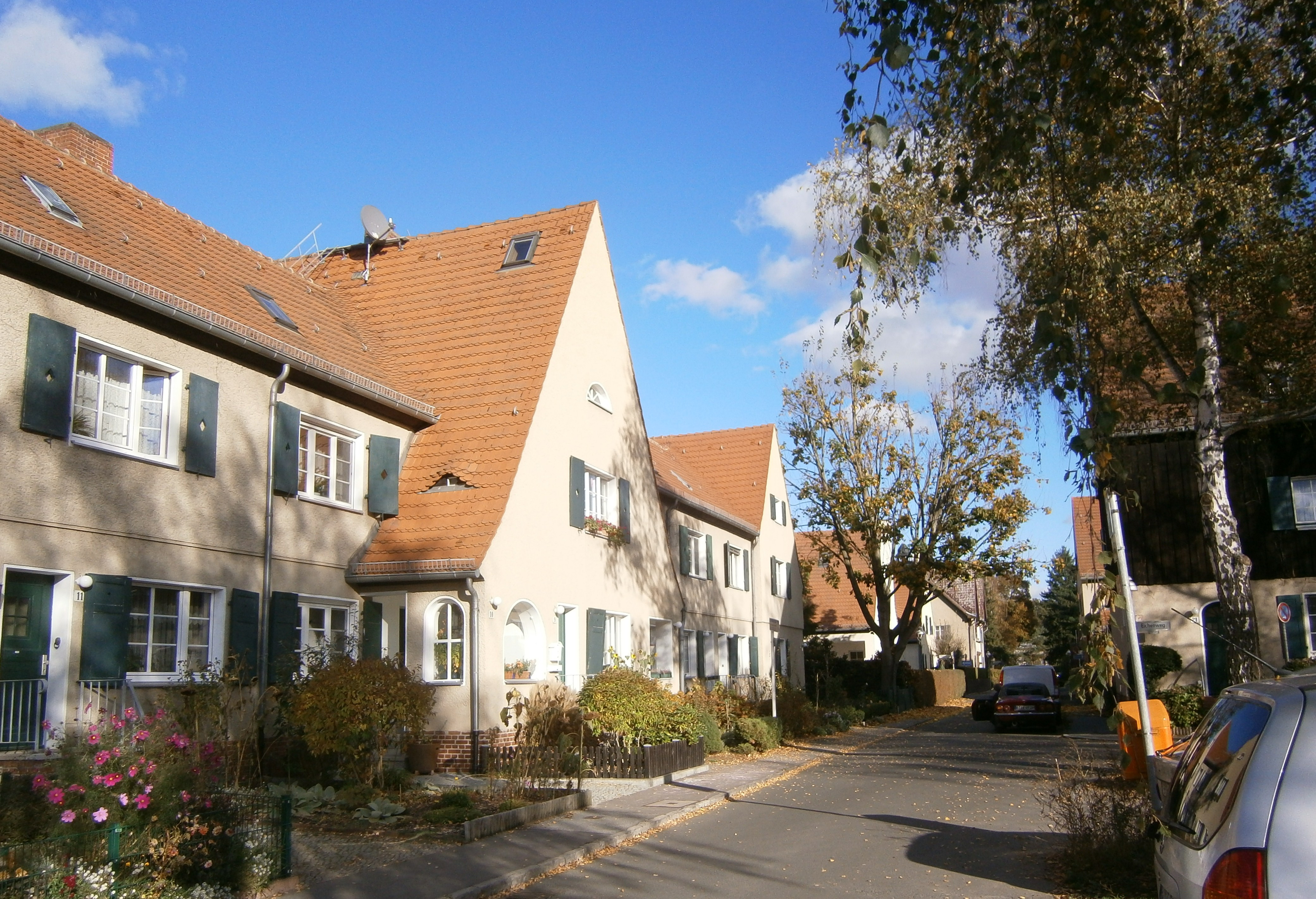 Buchenweg ist eine Straße im Berliner Ortsteil Hakenfelde.